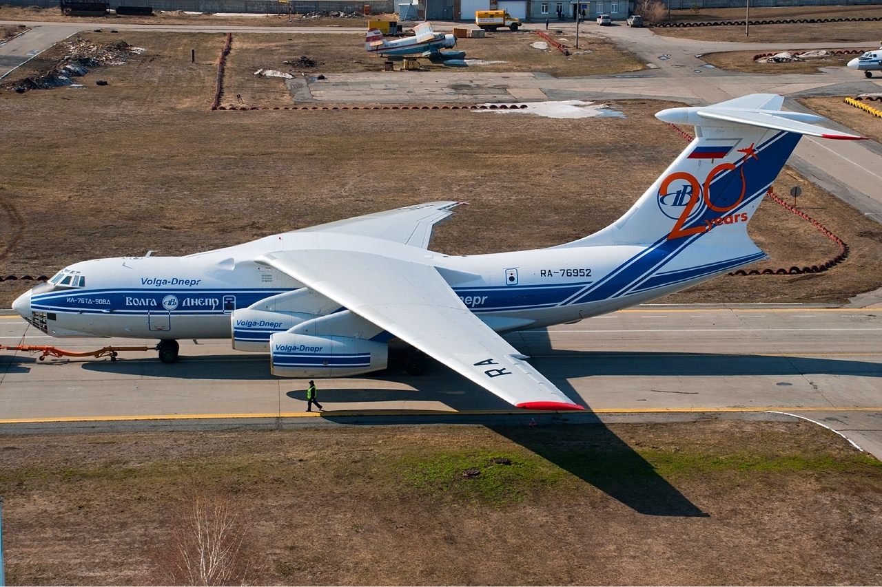 Volga-Dnepr Ilyushin Il-76TD-90VD